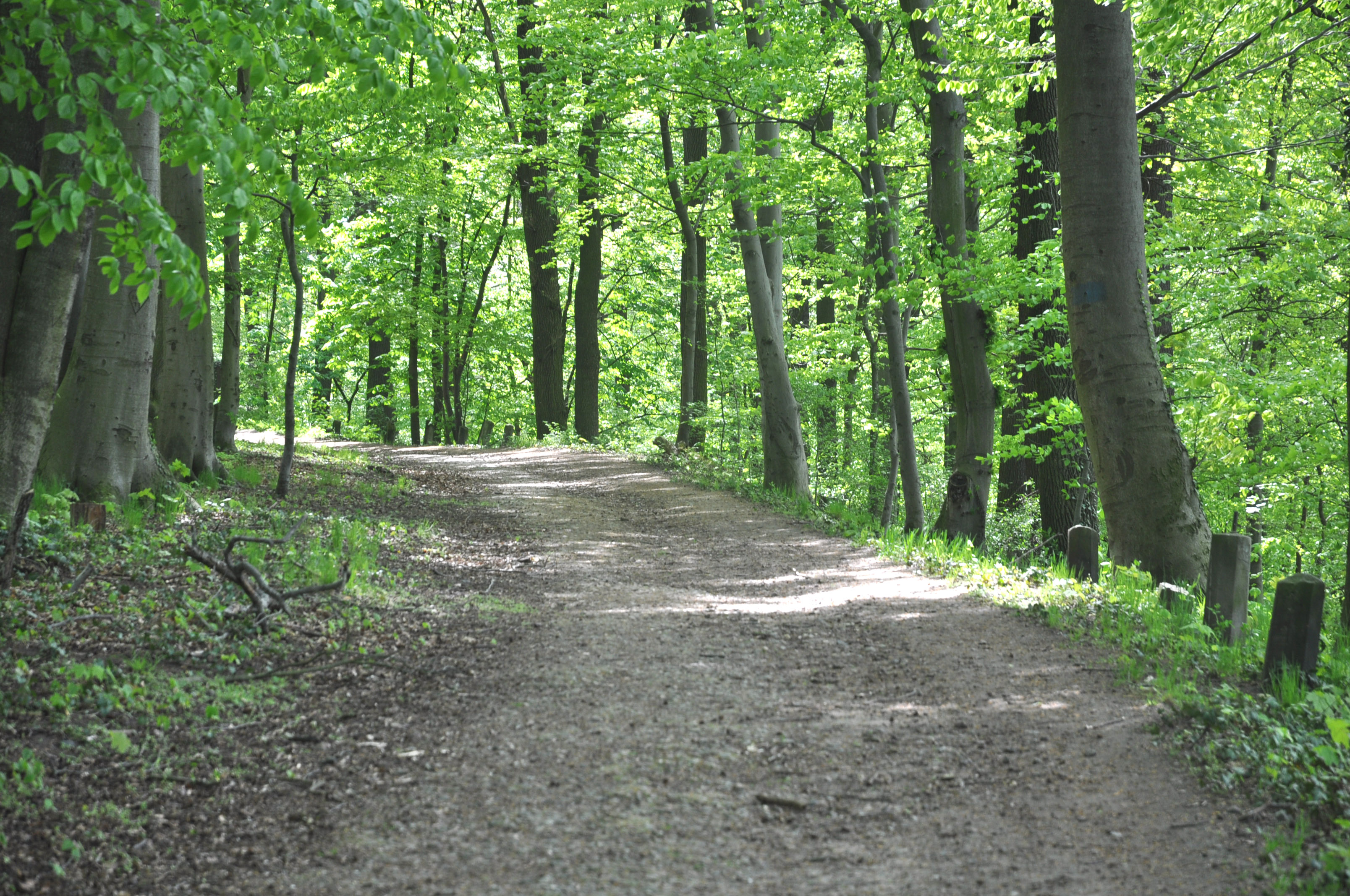 Park Klein-Glienicke, Hangkantendrive am Böttcherberg